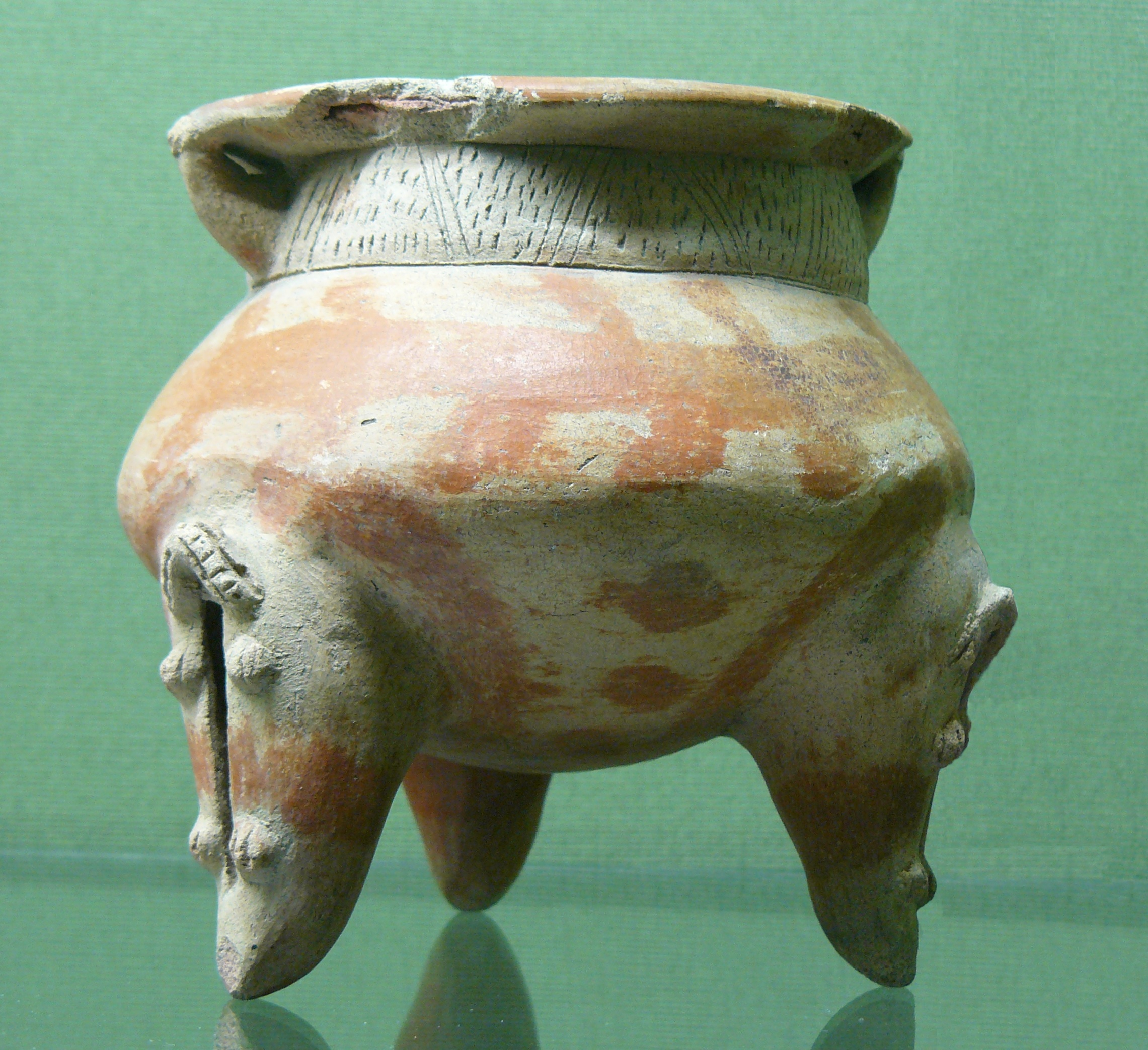 Poterie culture Chiriqui, Panama préhispanique, XIIe - XVIe siècle, collecte du docteur Ménard de Saint Maurice, médecin de la Compagnie de Panama, vers 1880 - Musée national de céramique, Sèvres (Hauts-de-Seine, France) - Inv n° MNC ?